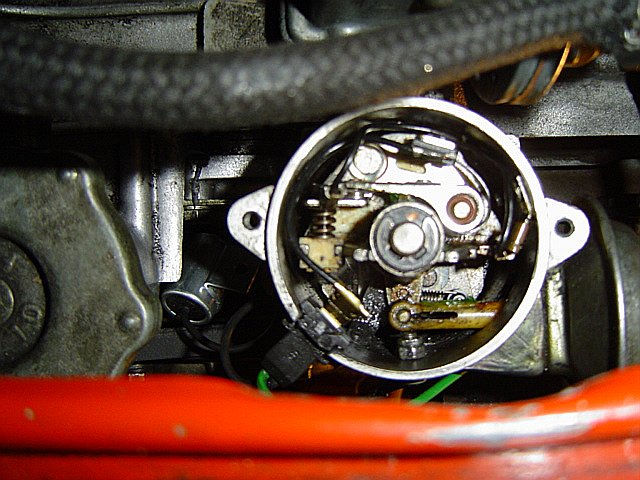 Zündunterbrecher Fiat 126 BIS